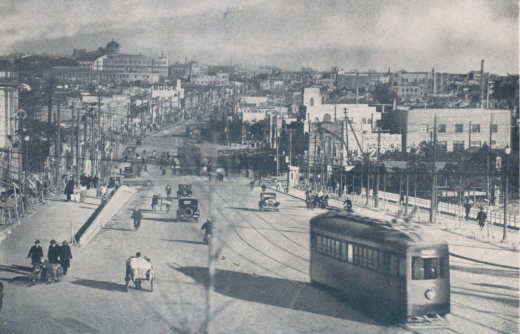 九段坂から神田神保町を望む。遠景にニコライ堂